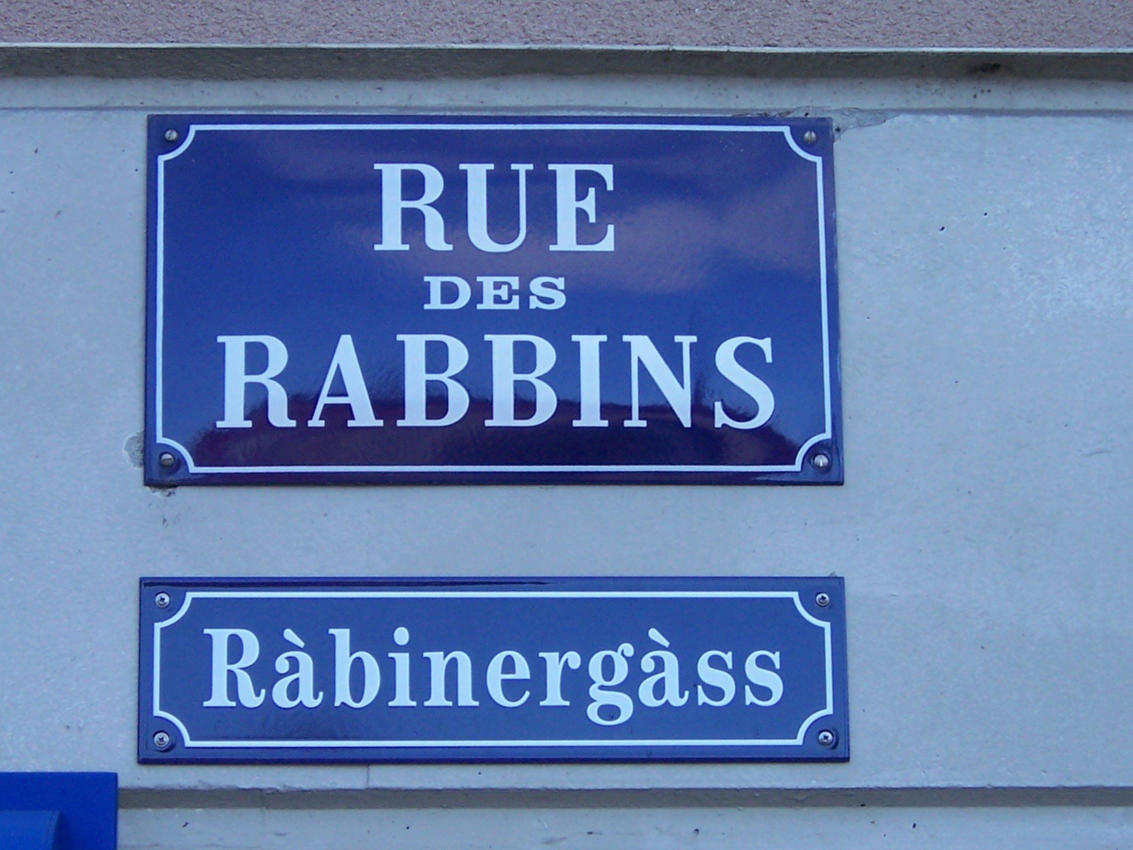 France - Alsace - Mulhouse, plaque de la "Rue des Rabbins" (en français et en alsacien).